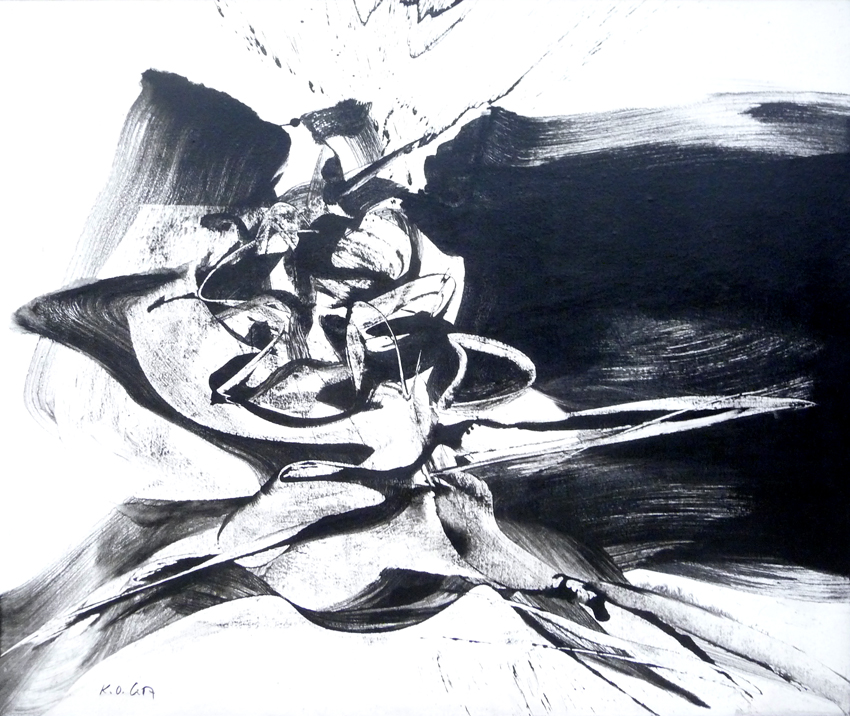 K. O. Götz, Riemu, 1968, Mischtechnik auf Leinen, 100 x 120 cm